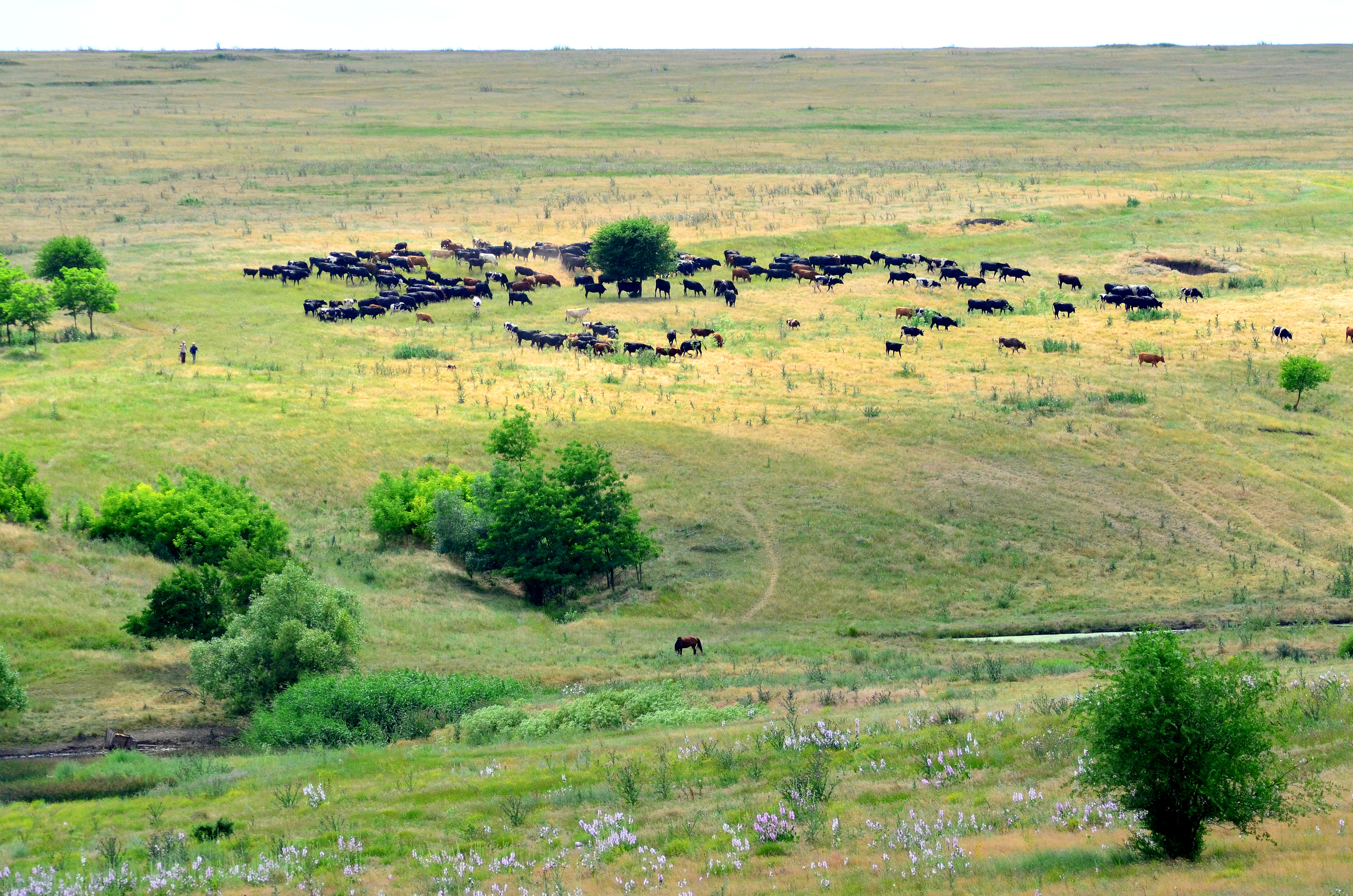 «Тарутинський степ», Тарутинський р-н